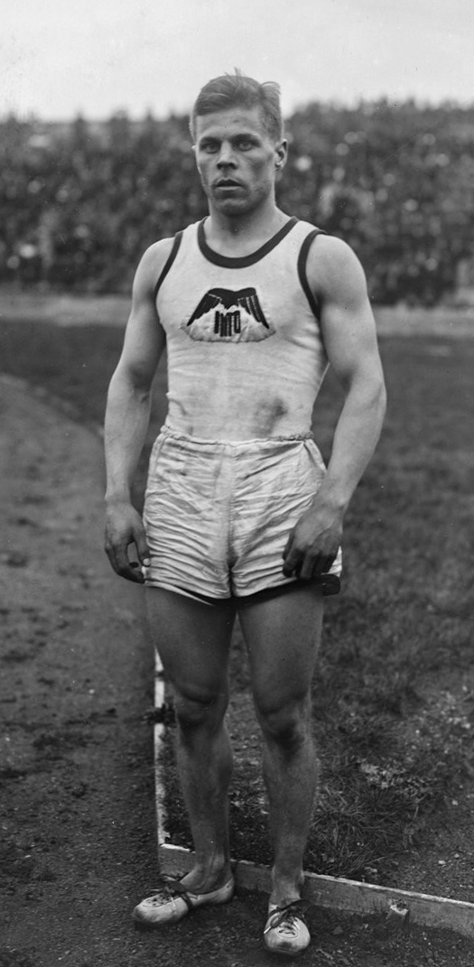 Haro [coureur finlandais, stade Pershing, le 8 octobre 1922] : [photographie de presse] / [Agence Rol]